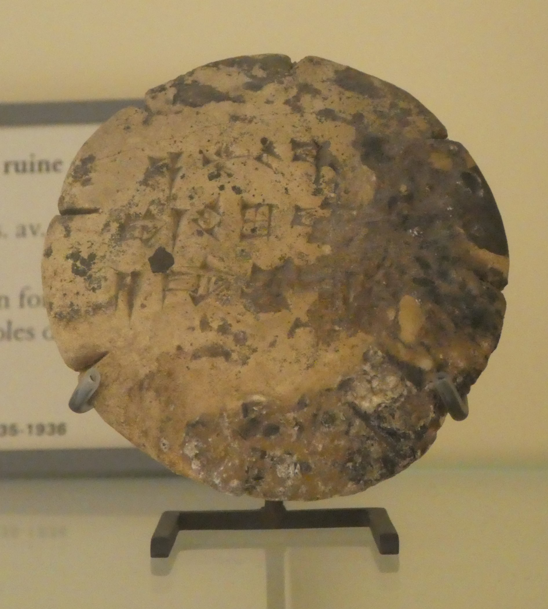 Tablette rapportant un présage à la suite d'une consultation d'hépatoscopie (divination dans le foie d'un agneau). Traduction de l'inscription : "Présage de la chute d'Akkad". Edition et traduction dans Maggie RUTTEN, "TRENTE-DEUX MODÈLES DE FOIES EN ARGILE INSCRITS PROVENANT DE TELL-HARIRI (MARI)", dans Revue d'Assyriologie et d'archéologie orientale, Vol. 35, No. 1, 1938, p. 42 et planche II (tablette n°4). Tablette exhumée dans le palais de Mari, site de Tell Hariri, datant du début du XVIIIe siècle av. J.-C.